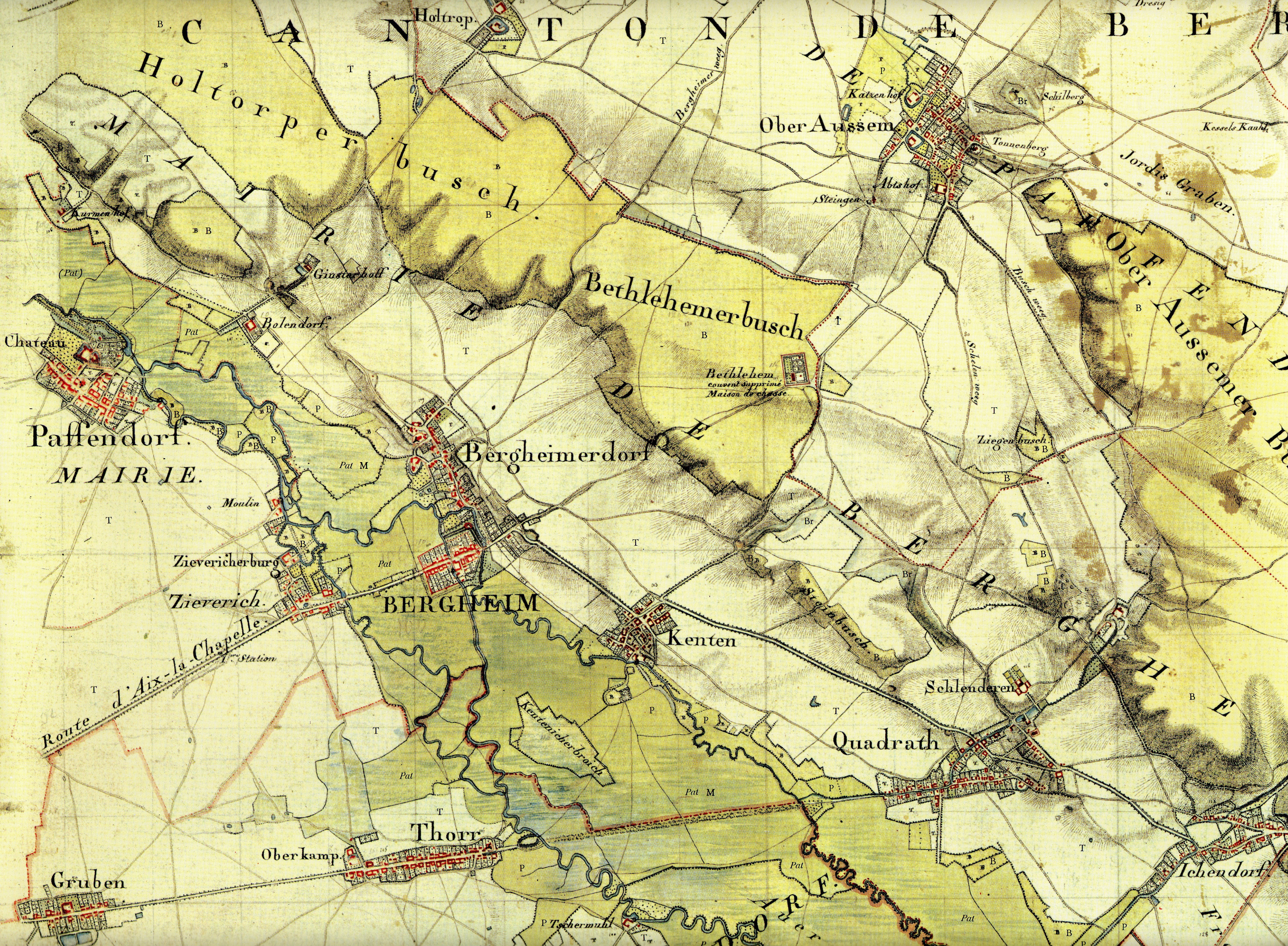 Kartenaufnahme der Rheinlande durch Tranchot und von Müffling 1803-1820 Blatt 70 - Bergheim; hier Detail mittig links